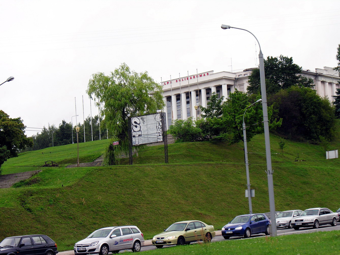 Vilnius Tauro kalnas Foto: Algirdas, 2006 m. rugpjūčio 10 d., Lietuva